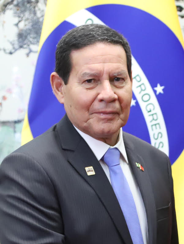 (Pequim - China, 24/05/2019) Vice-Presidente da República, Hamilton Mourão, durante audiência com o Presidente da Conferência Consultiva Política do Povo Chinês, Senhor Wang Yang. Foto: Adnilton Farias / VPR